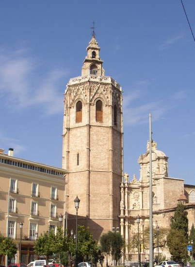 Micalet (Seu de València)